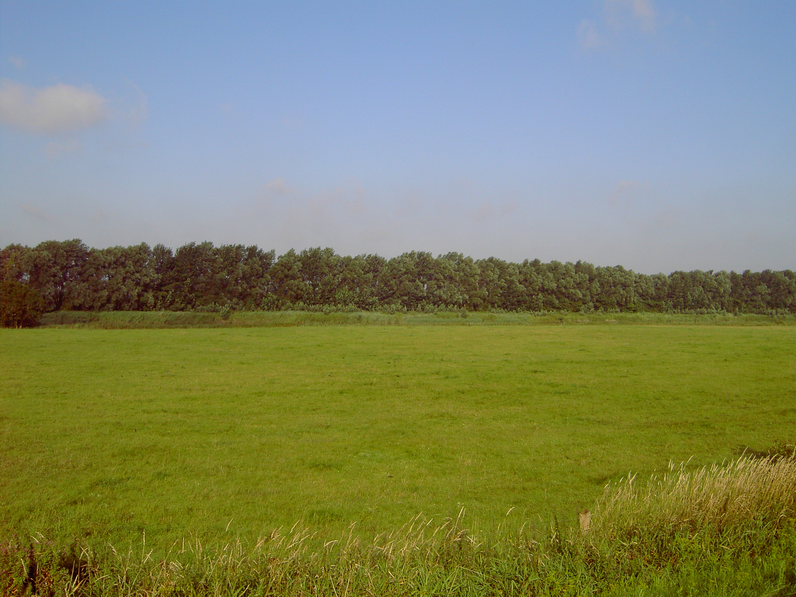 Wallhecke in Ostfriesland